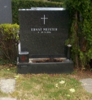 Ernst Meister Grabstätte